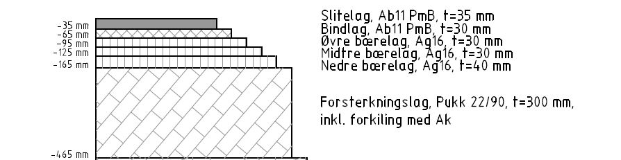 Her synes alle lagene med asfalt og nederst kommer et lag med pukk